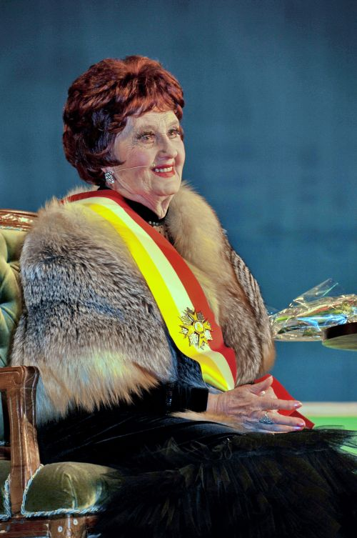 90 летний юбилей актрисы